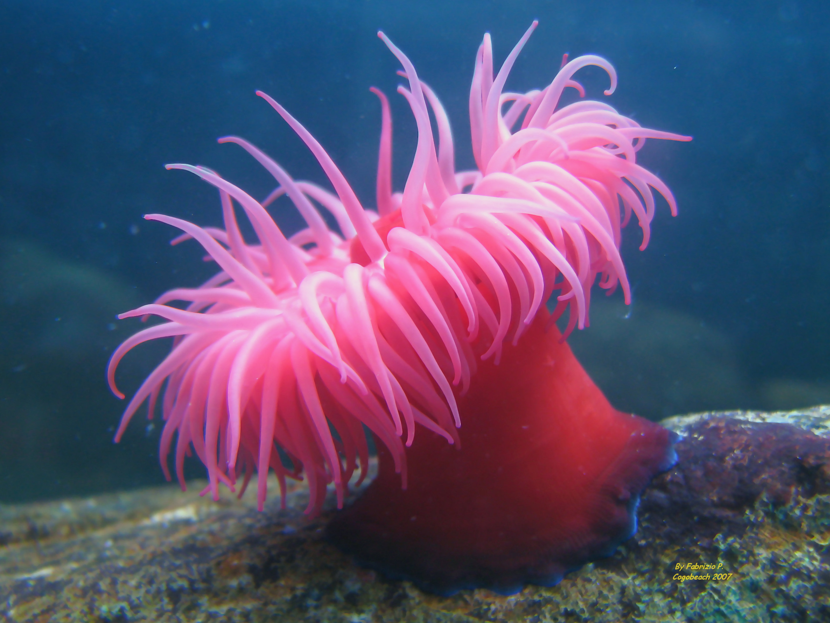 Autore: Fabrizio P. Fonte: Immagine propria Descrizione: Actinia equina (Mar Ligure) Licenza: Qualunque uso purche citato l'autore Note: nessuna